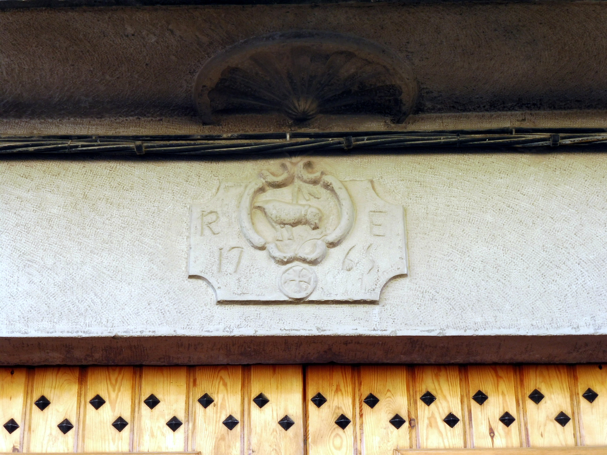 Cal Coronel (Vallfogona de Balaguer): llinda del portal